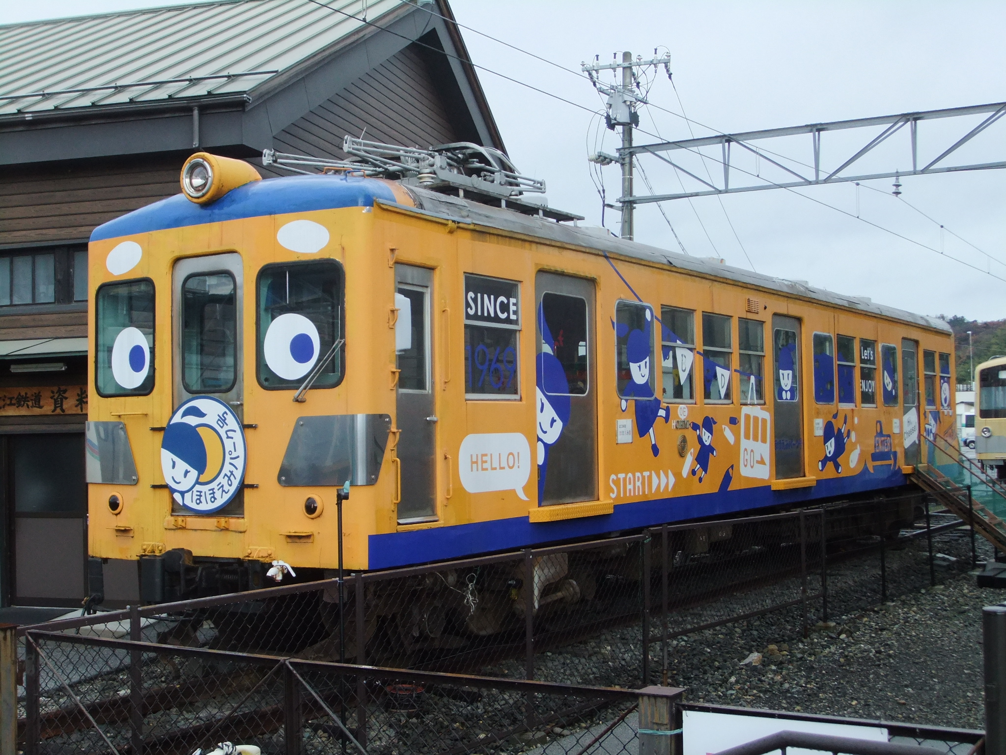 「ほほえみ園」の遊具となった近江鉄道501